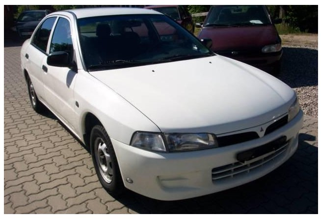 Mitsubishi Lancer Limousine